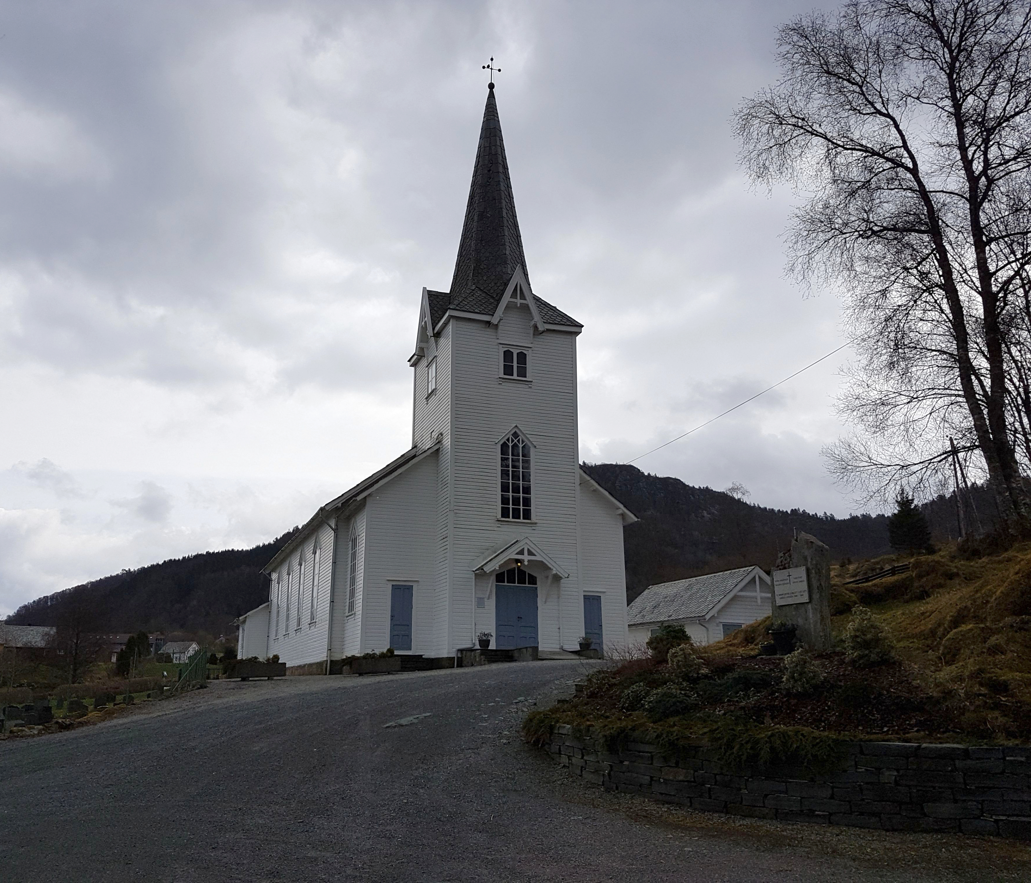 Tysnes kirke. Foto: Roger Grimelid. Fra Riksantikvarens Kulturminnesøk.